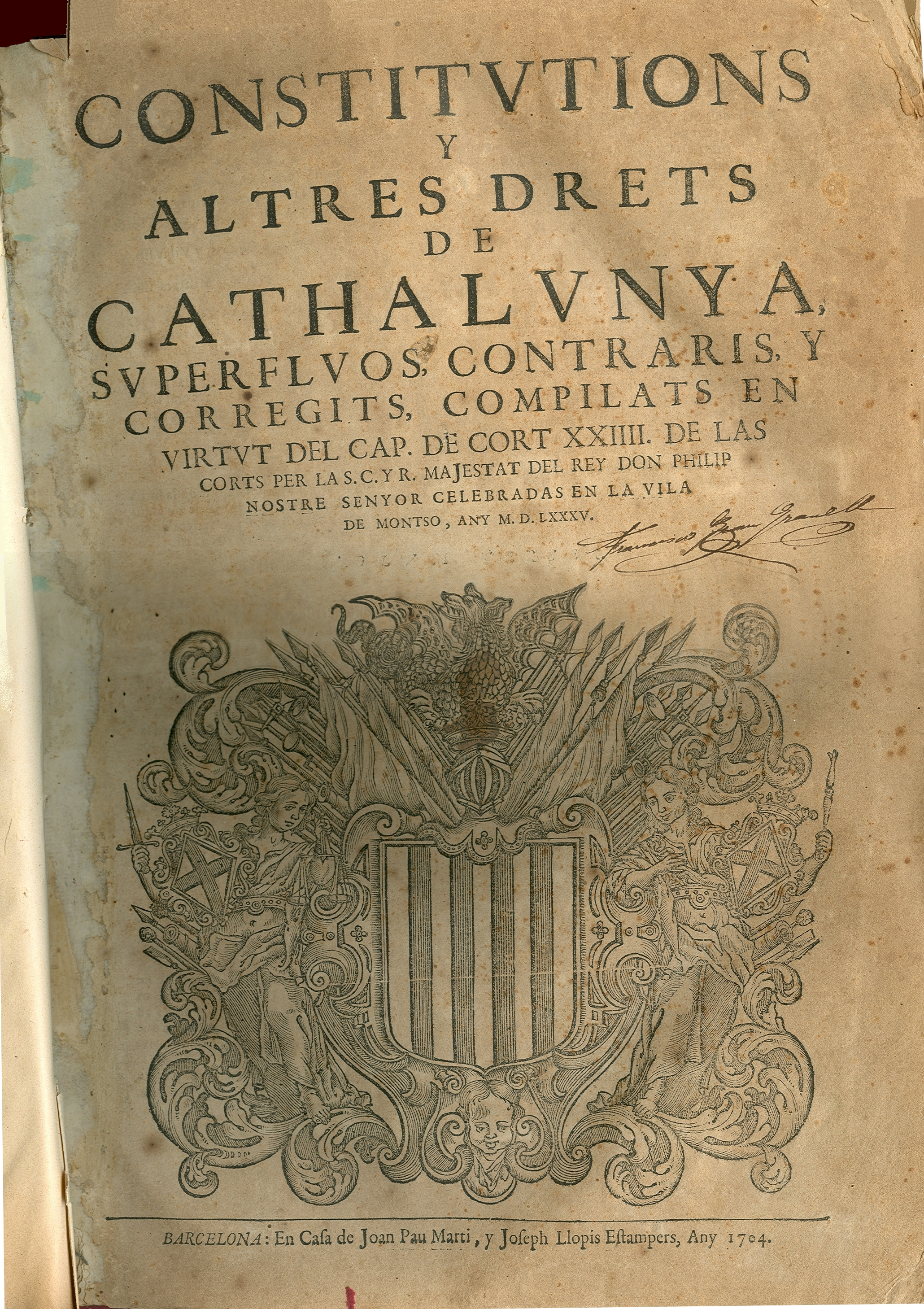 Constitucions i Altres Drets de Catalhunya. Compilació de les Corts de Montsó, de l’any 1585.